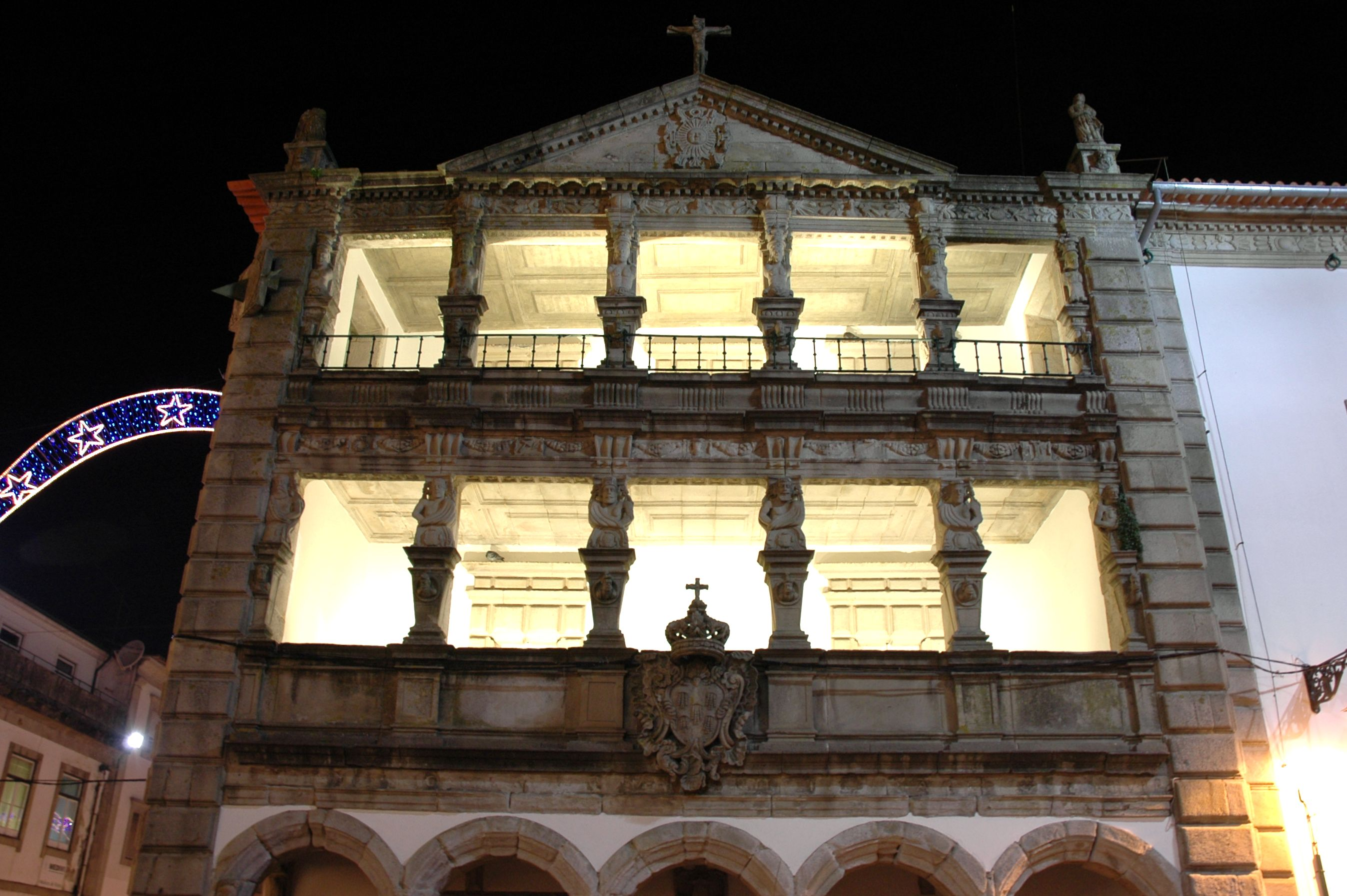 Viana do Castelo - Casa Misericòrdia nit